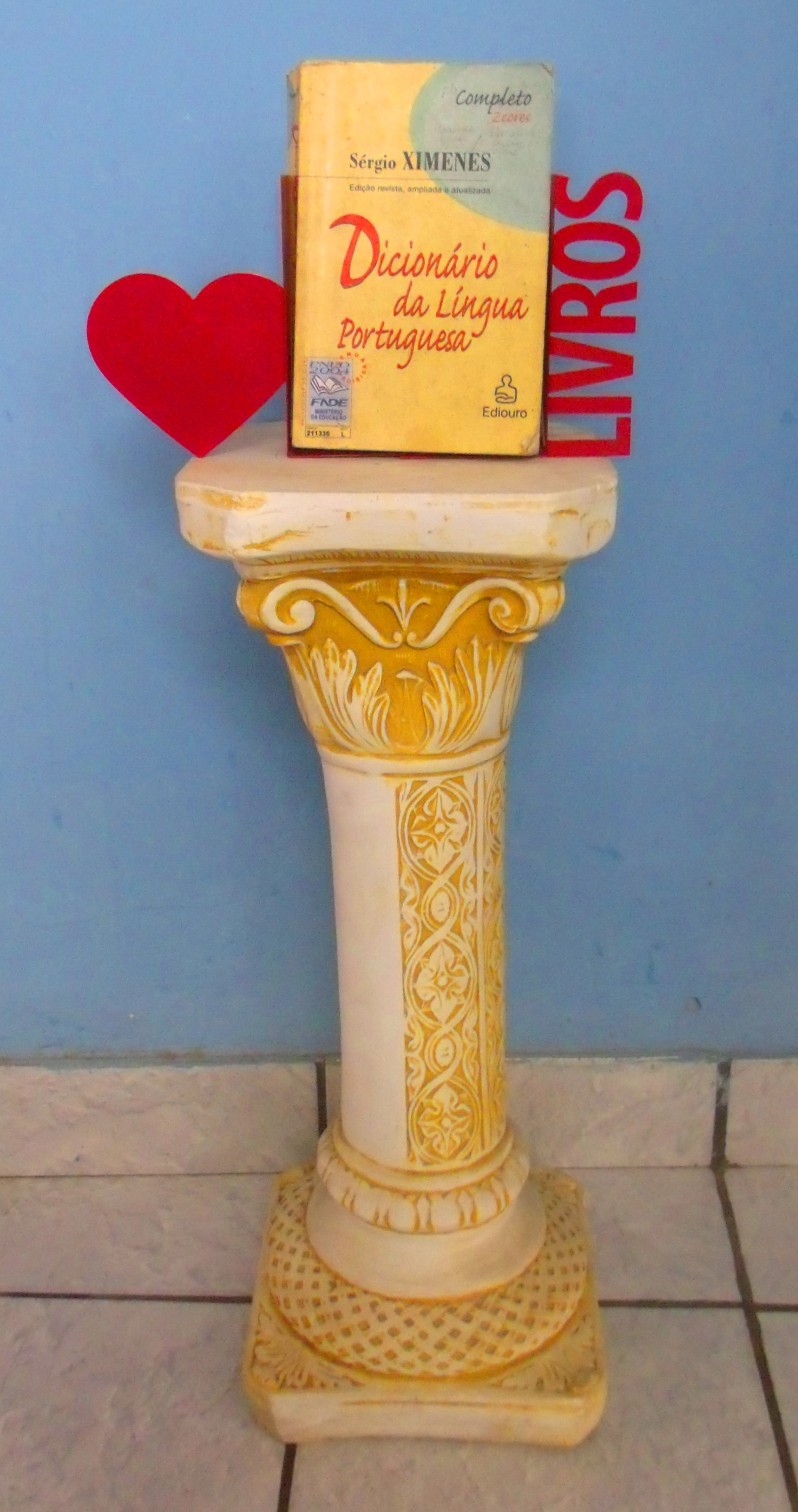 Coluna clássica de decoração com o Dicionário da língua portuguesa, de Sérgio Ximenes.